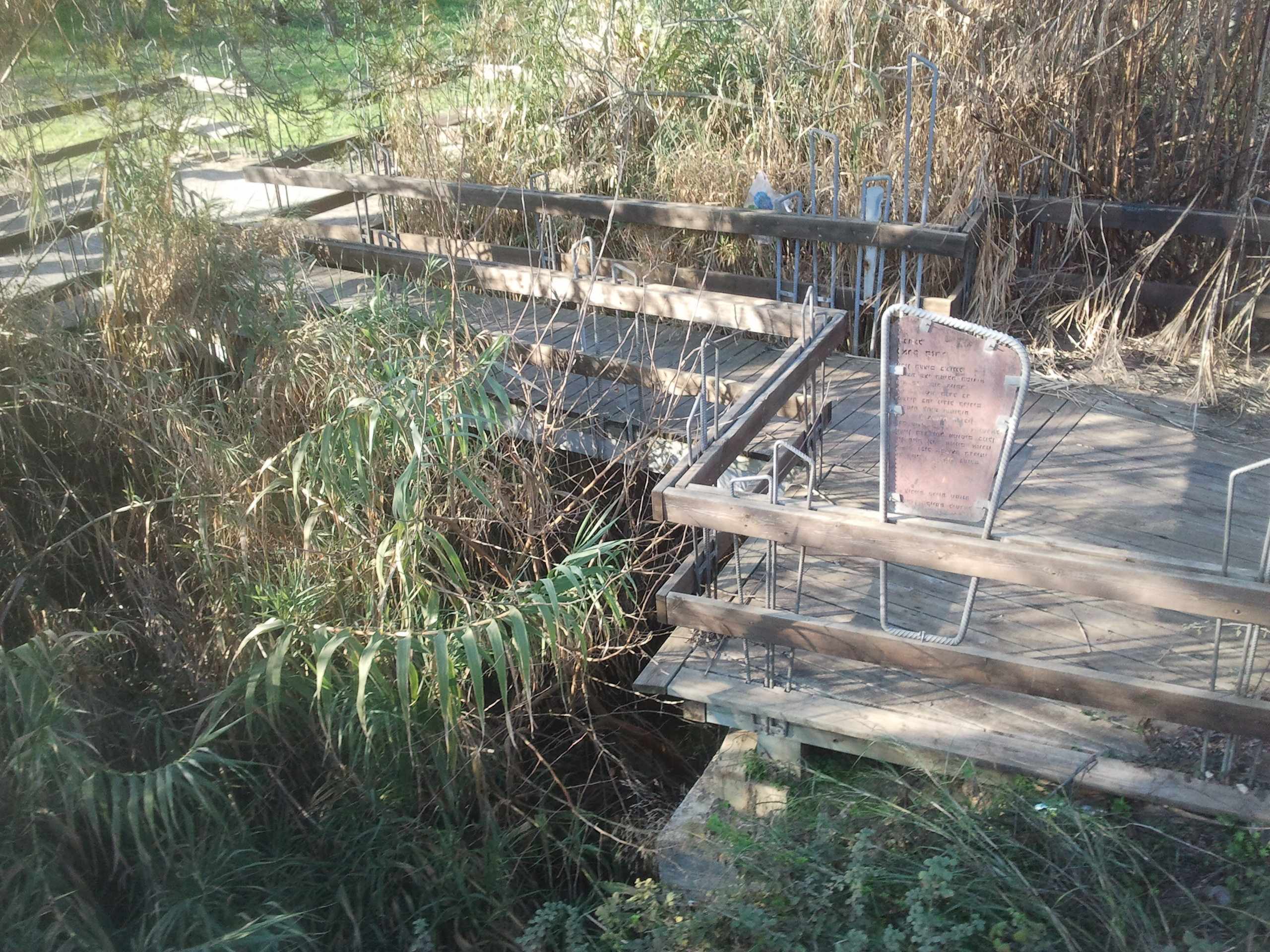 פארק הזהב הוא הפארק המרכזי העירוני בקרית שמונה. בתוכו זורם נחל עין זהב גשר מעבר לפארק